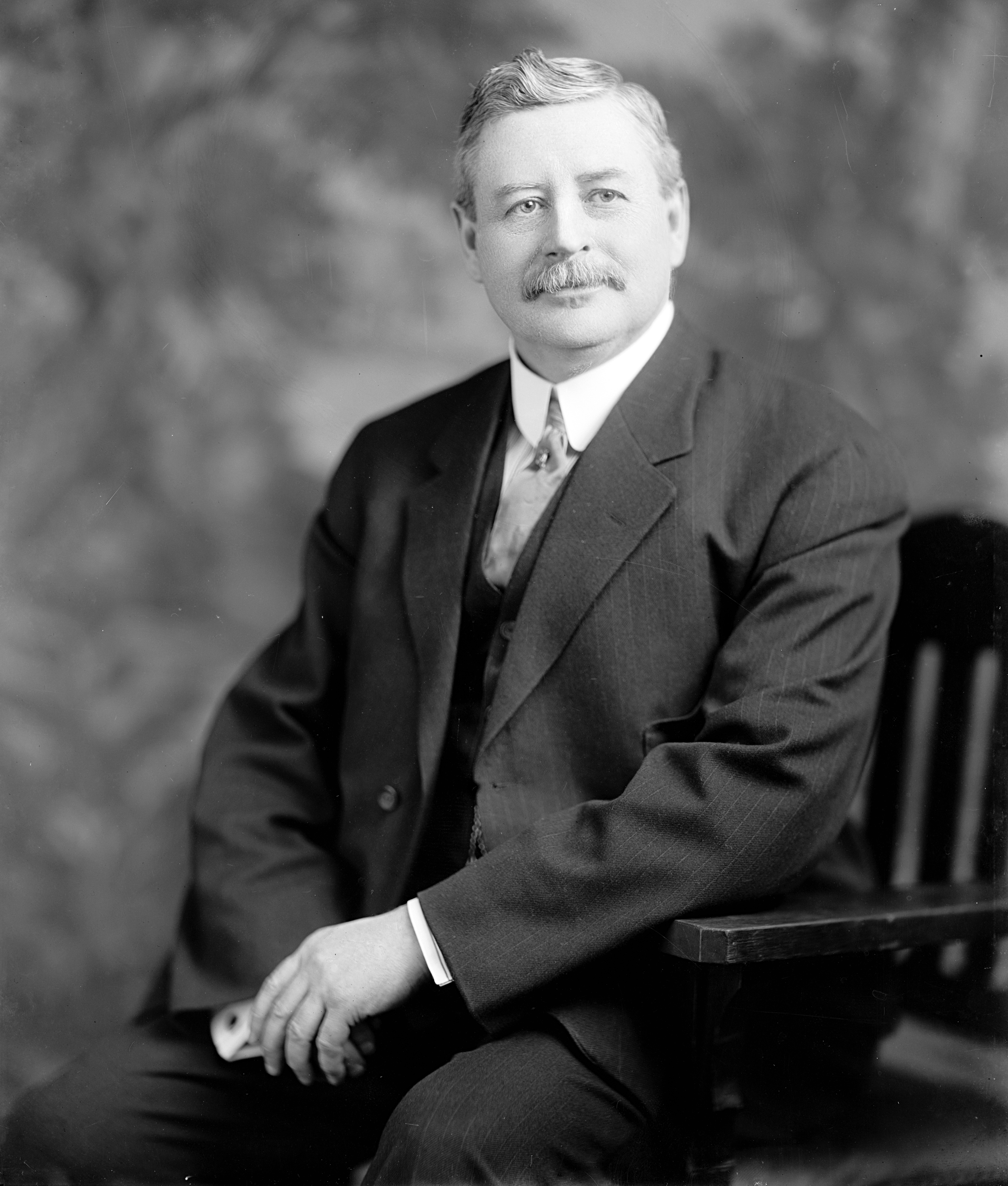 Peter Moore Speer, US Representative from Pennsylvania